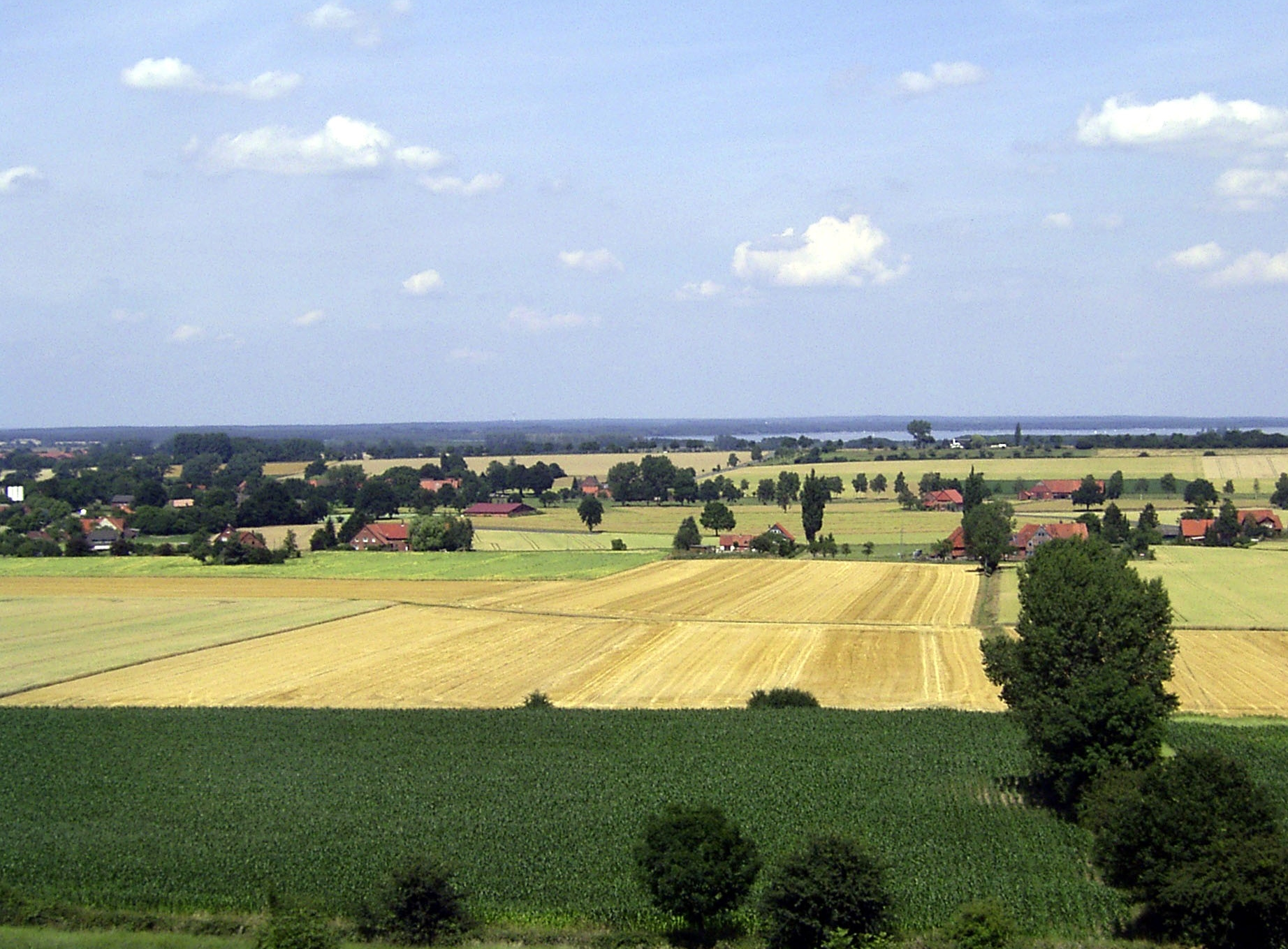 Schmalenbruch am Steinhuder Meer, Gemeinde Wölpinghausen im Landkreis Schaumburg, Niedersachsen